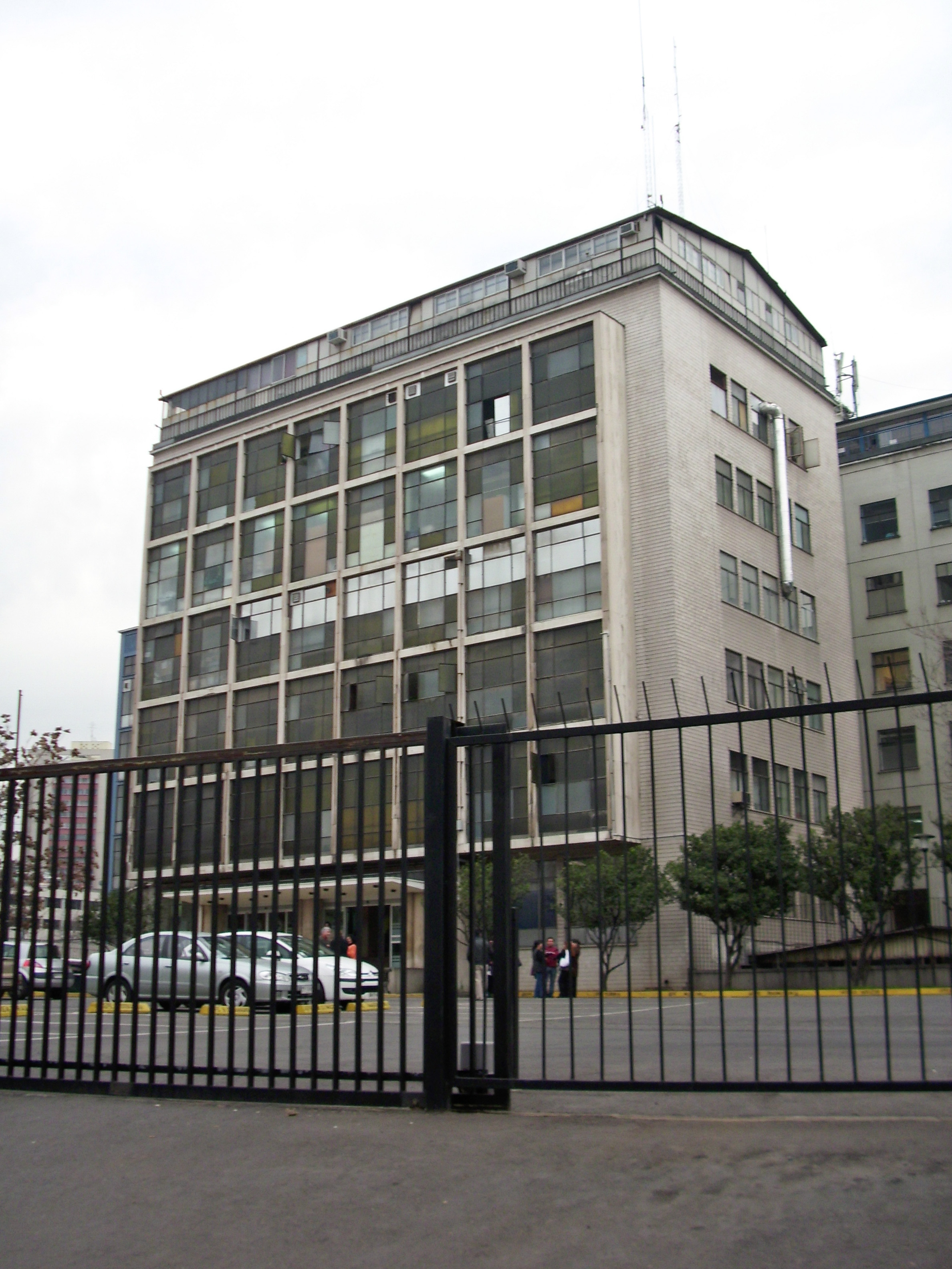 El Hospital de Urgencia de la Asistencia Pública Dr. Alejandro del Río (H.U.A.P), más conocido como Posta Central, ubicado en Av. Portugal 125, Santiago de Chile.